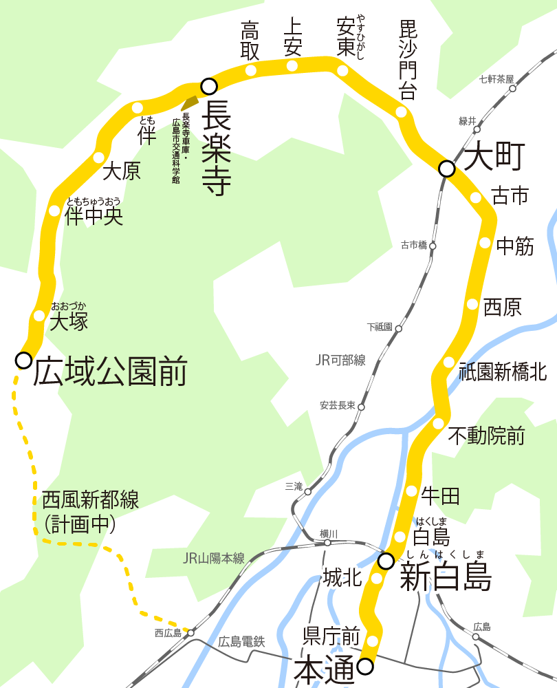 広島高速交通広島新交通1号線(アストラムライン)路線図